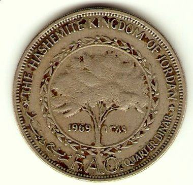 صورة لأحد العملات النحاسية في عام 1969